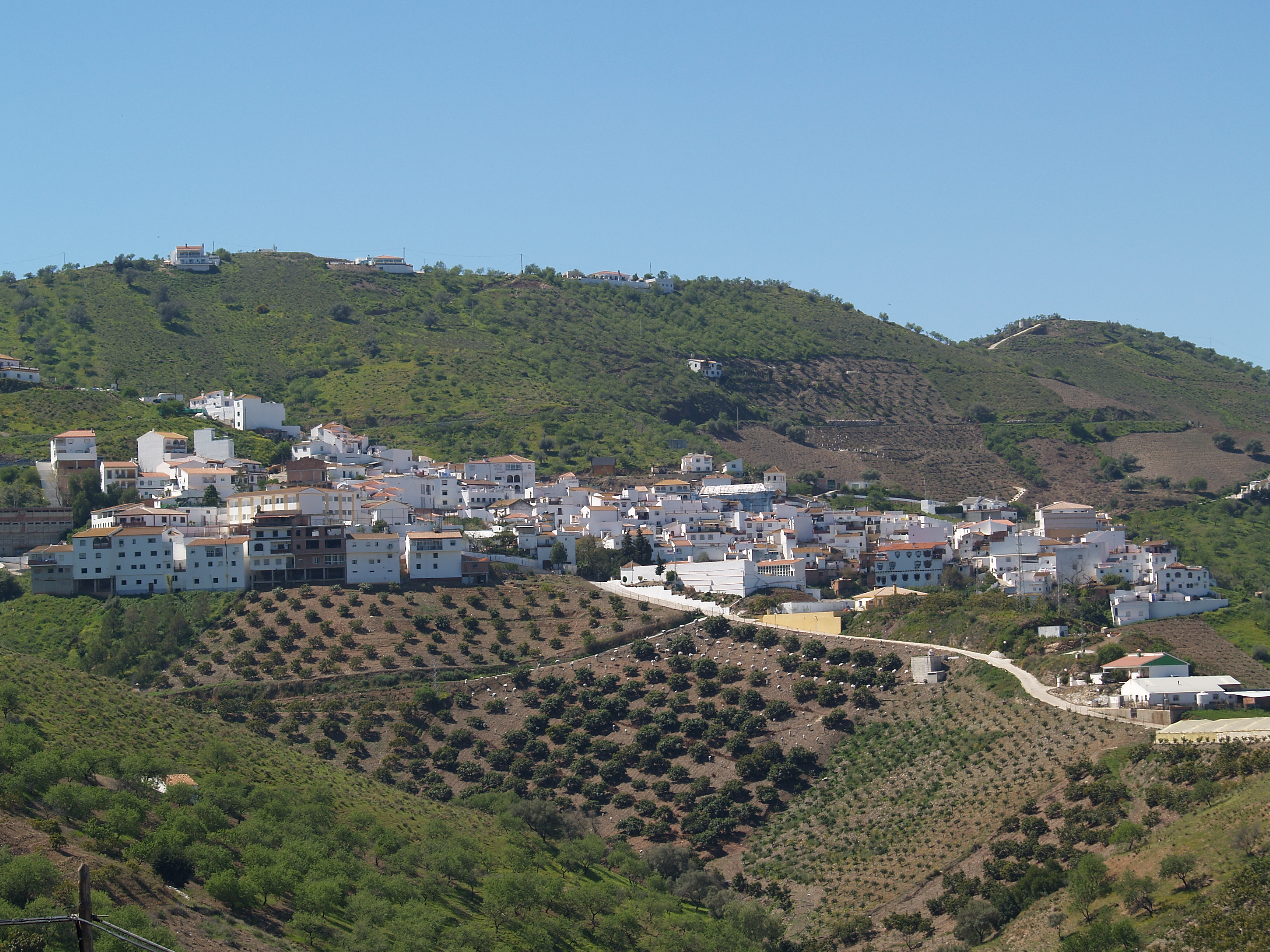 Iznate